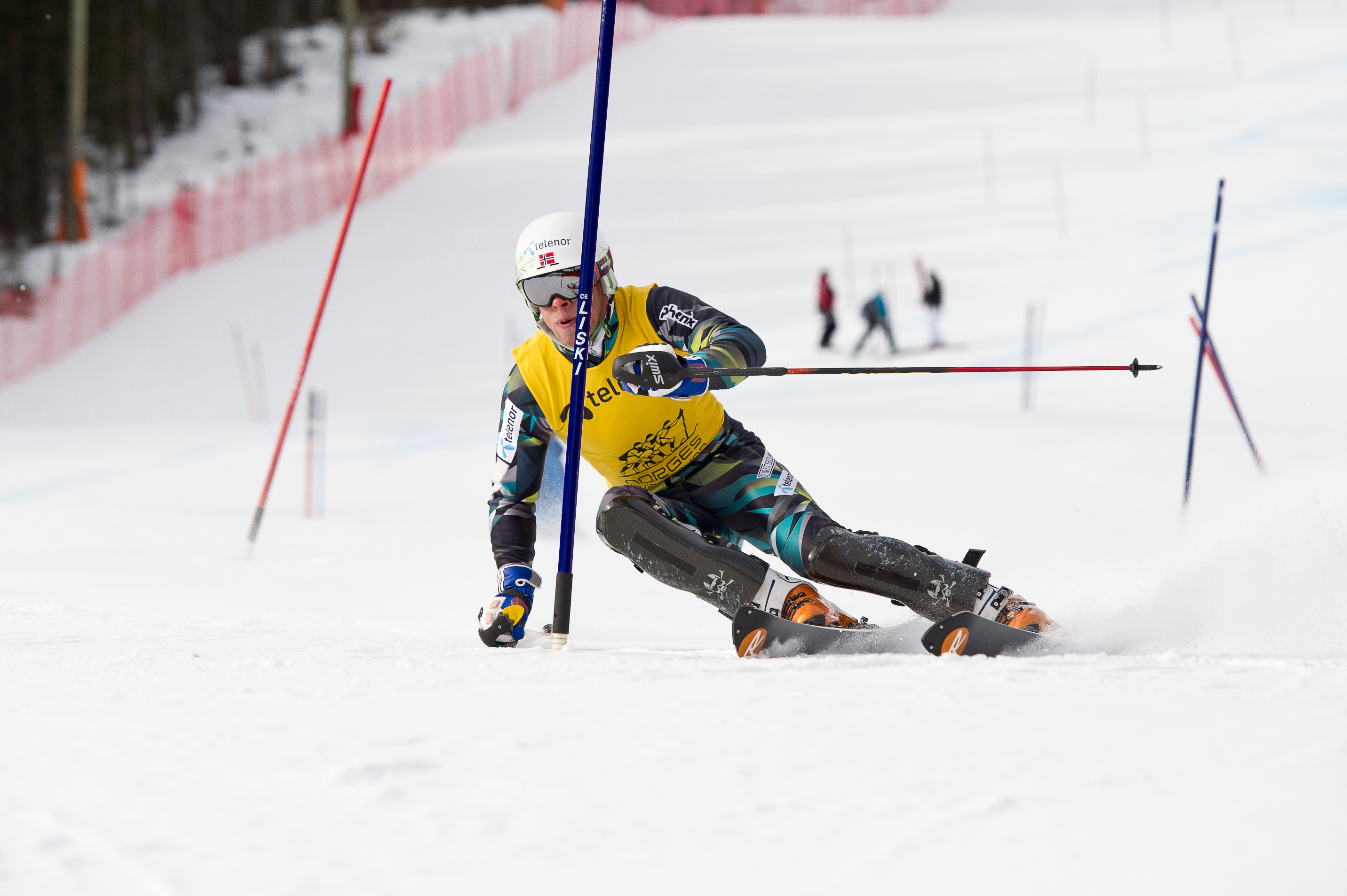 Lars Elton Myhre kjører NM i slalåm i Trysil. Foto: Ola Matsson